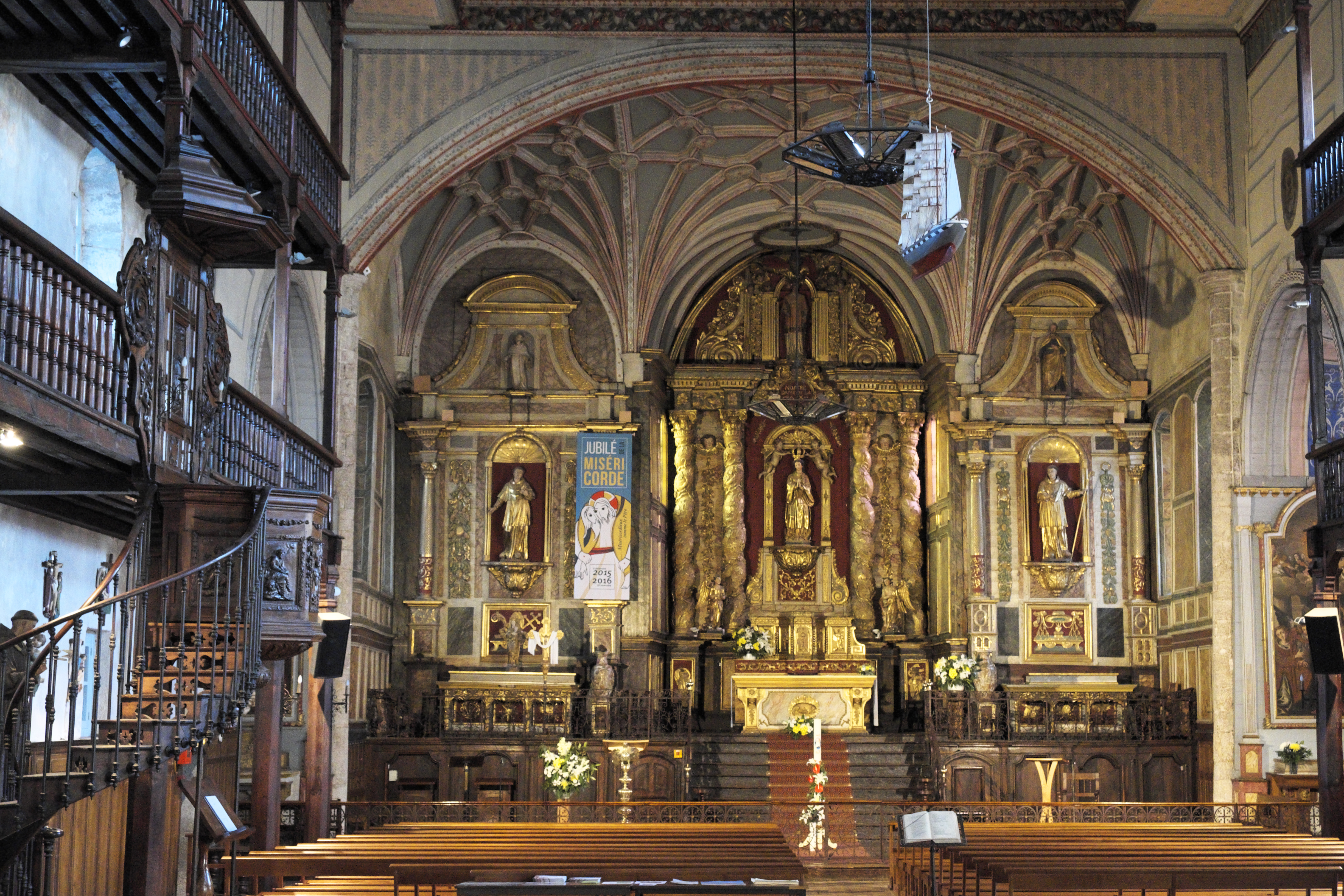 Kirche Saint-Vincent in Ciboure im Département Pyrénées-Atlantiques (Region Aquitaine-Limousin-Poitou-Charentes/Frankreich), Chor mit Altarretabel